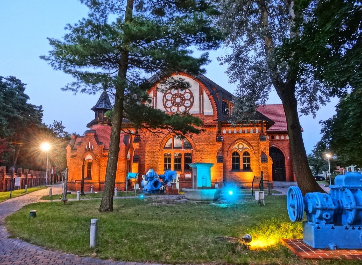 Zabytkowa stacja wodociągów Las Gdański w Bydgoszczy (ujęcie głębione 1900 r.) przy ul. Gdańskiej 242; mieści muzeum wodociągów